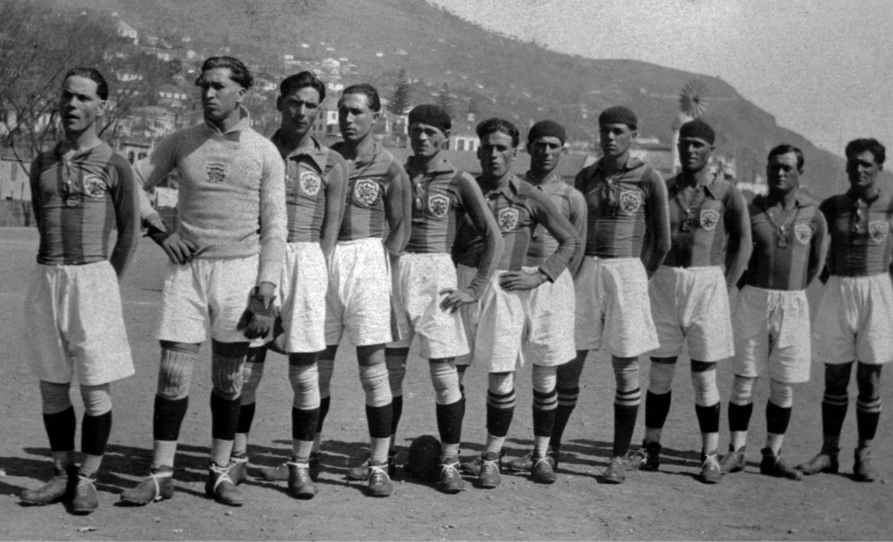 Equipa do Club Sport Marítimo vencedora do campeonato de Portugal de 1926 Jose Ramos, José Pequeno, Ortega, Manuel Ramos Janota, António Teixeira Camarão, José Fernandes Bizugo, Domingos Vasconcelos Beiçolinhas, José Correia Mariazinha, Francisco Lopes Fancheca, José Sousa Patas, António Sousa Ranfão e António Alves. Campo Almirante Reis, 1926.